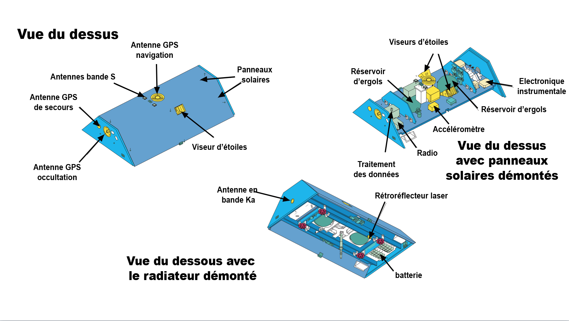 Schéma du satellite GRACE ( Gravity Recovery and Climate Experiment ) de la NASA et et de la DLR avec légende en francais